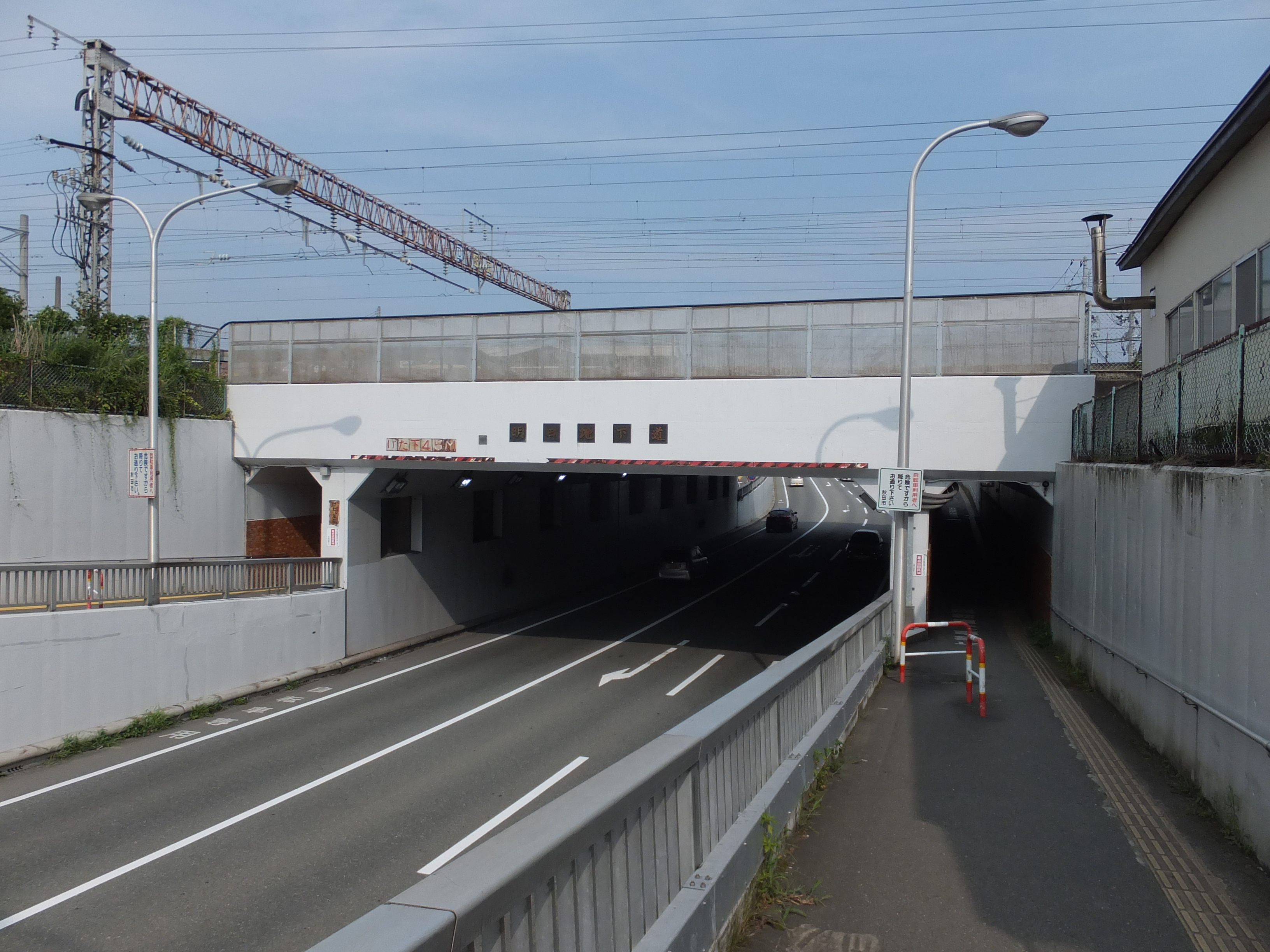 明田地下道（秋田市道、都市計画道路川尻広面線）